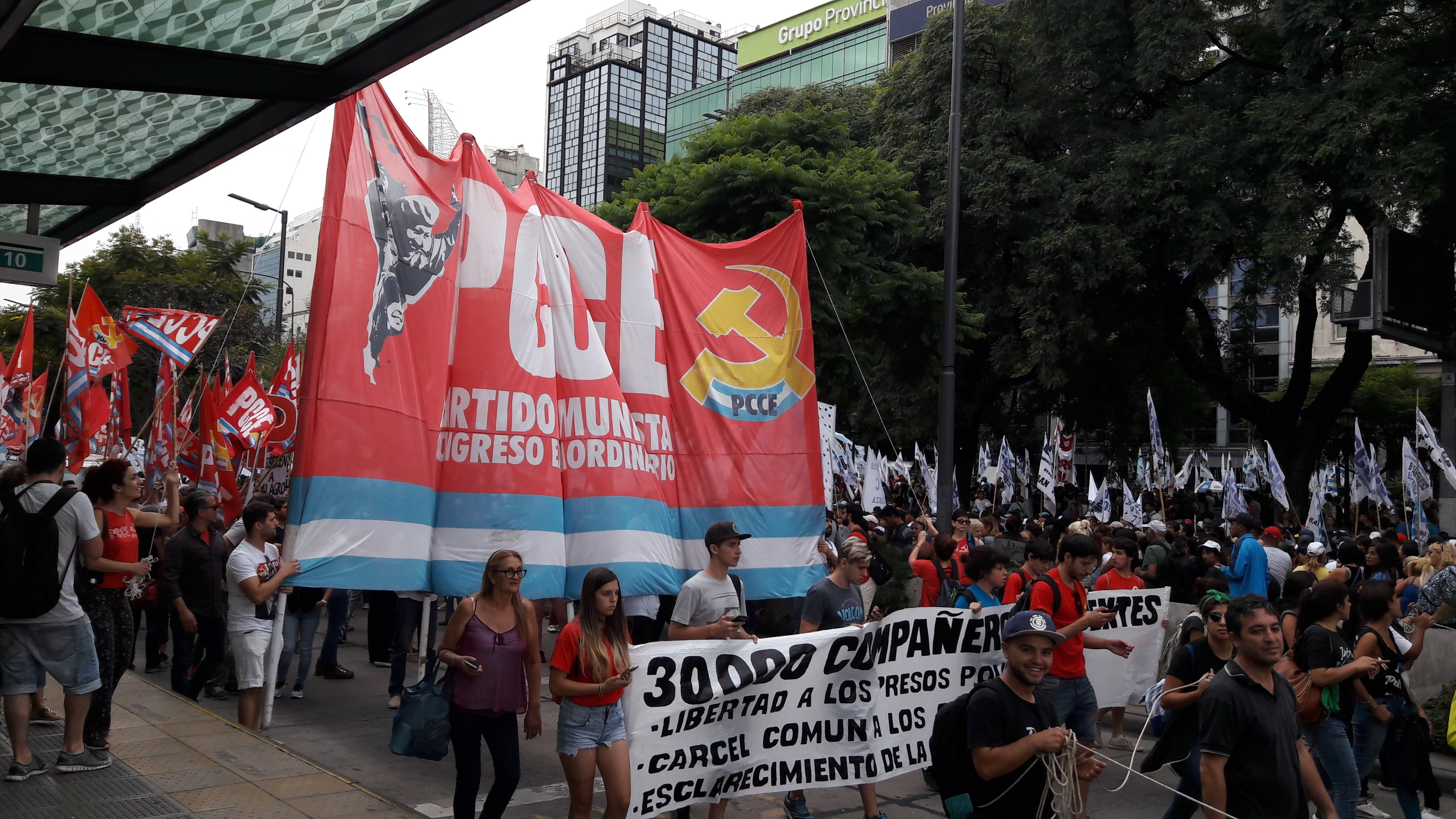 24M Marcha de la Memoria por la Verdad y Justicia en Buenos Aires, Argentina.